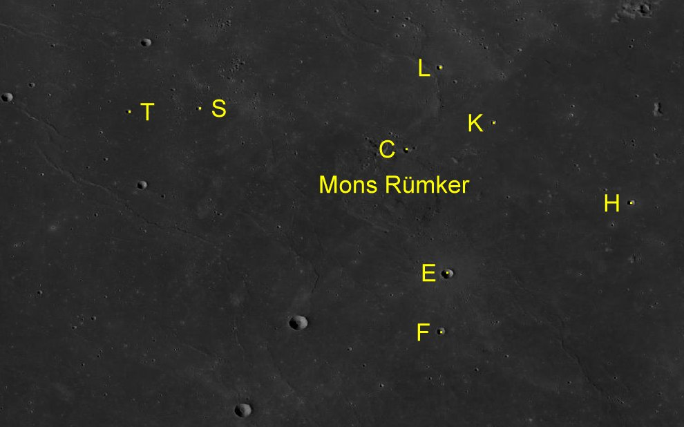 Mons Rümker. Cráteres satélite. (Imagen LRO)